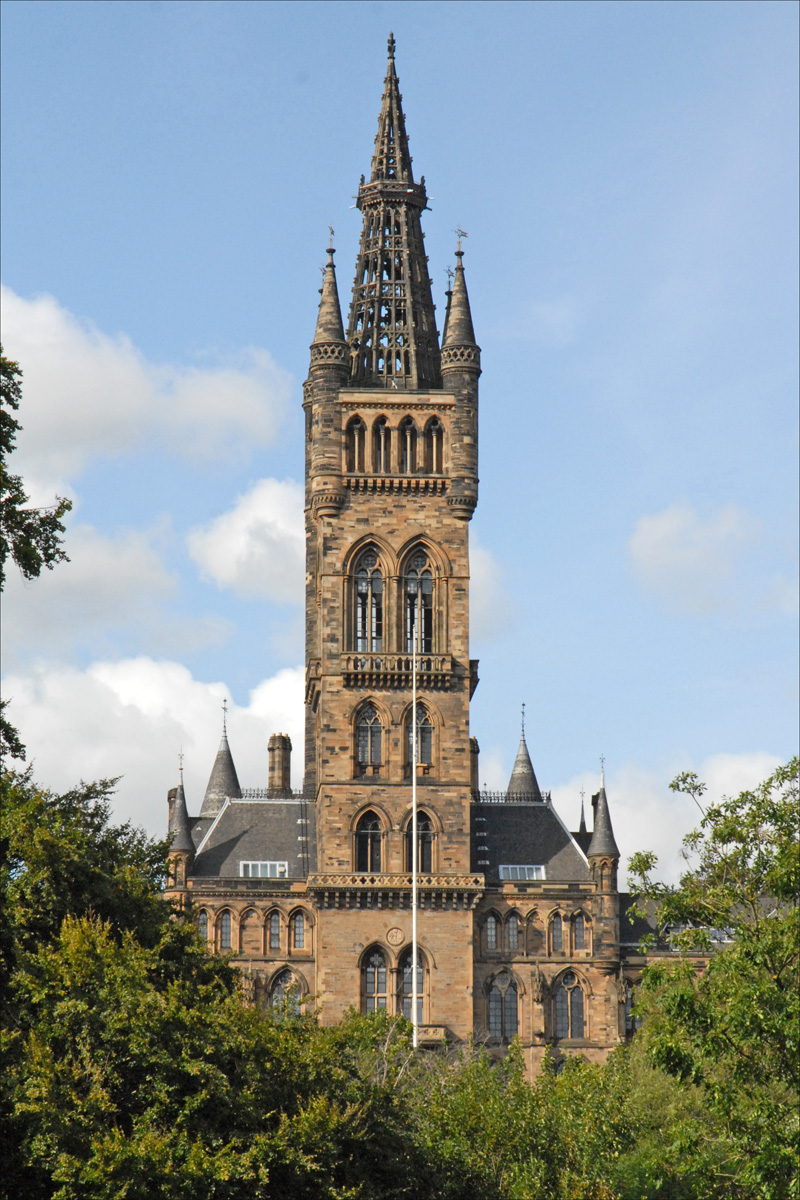 L'université de Glasgow a été fondée en 1451. Elle a été transférée sur la colline Gilmorehill au 19e siècle. Sur la photo, la tour du bâtiment principal de l'université de style néogothique conçu par l'architecte Sir George Gilbert Scott et par son fils John Oldrid Scott qui a rajouté la flèche..